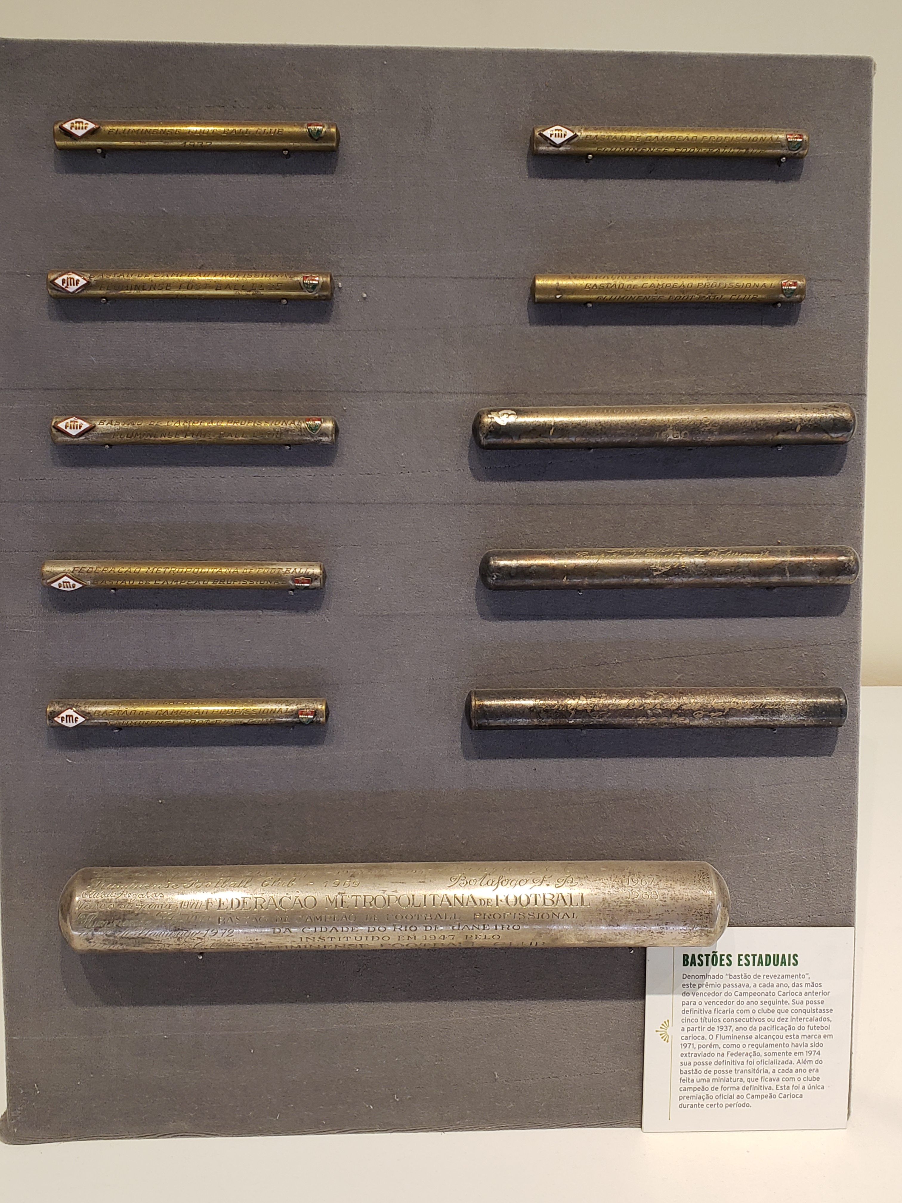 Bastões dos campeões cariocas futebol conquistados pelo Fluminense Football Club. Representam o período de conquistas de 1937 a 1973 do Campeonato Carioca. Instituído em 1948 seria entregue ao time que ganhasse o campeonato 10 vezes ou 5 consecutivas a partir de 1937, mas em 1961, a Federação Carioca deu pequenos bastões aos times campeões desde 1937. A partir daí, deu o pequeno bastão anualmente. Em 1971, o Fluminense ganhou o décimo campeonato, mas a tradição do revezamento do bastou continuou até 1973 e o Bastão original está com pose definitiva do Fluminense (informações do site Historiadores dos Esportes).